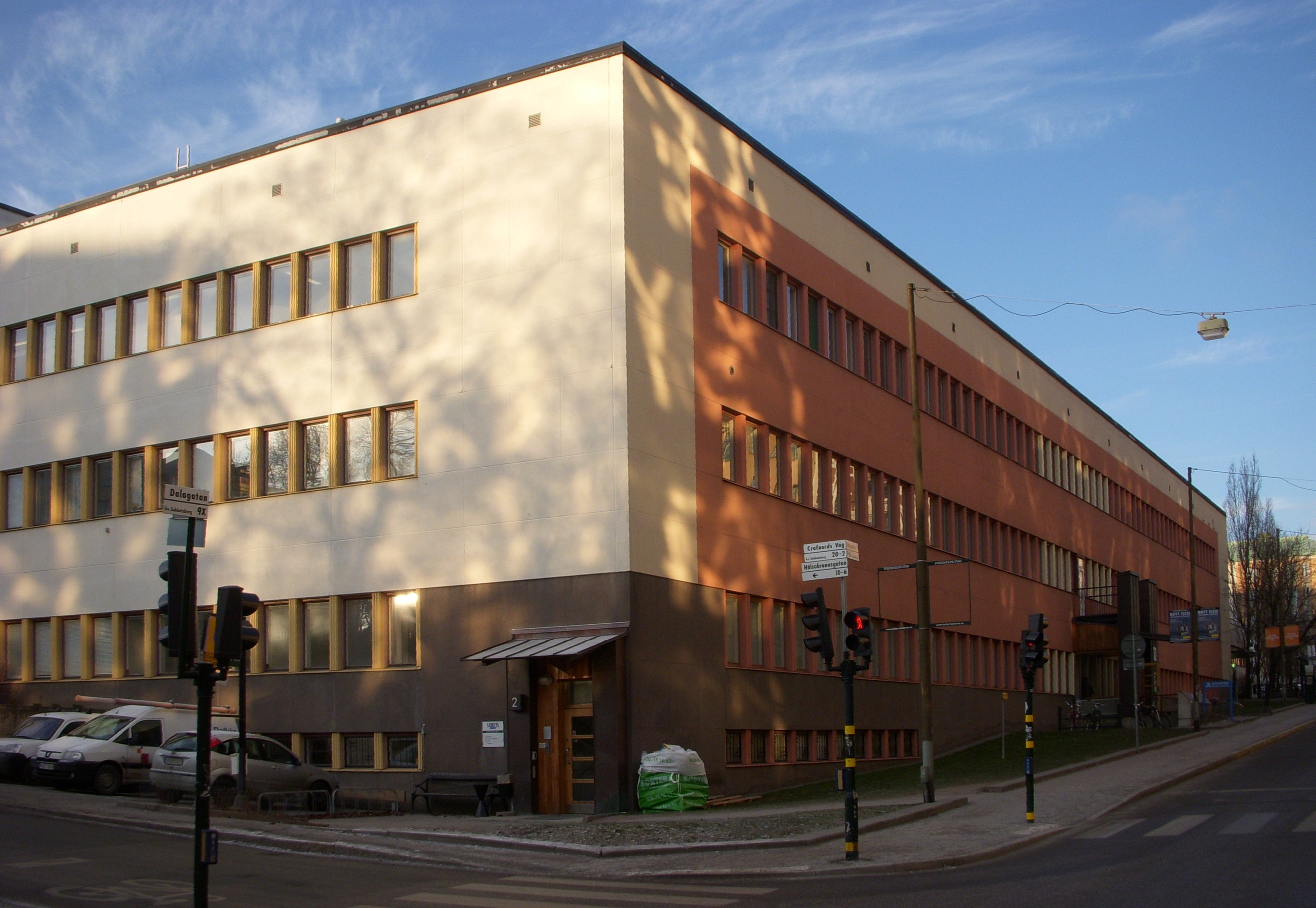 Sabbatsbergs sjukhus i Stockholm